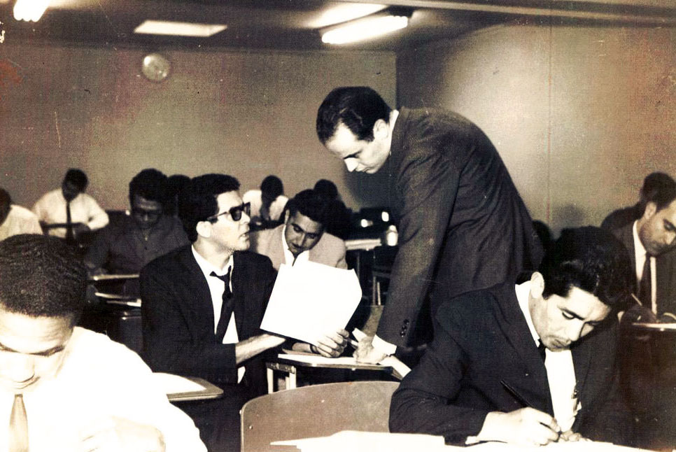 José Serra dando aulas no Chile em 1966.